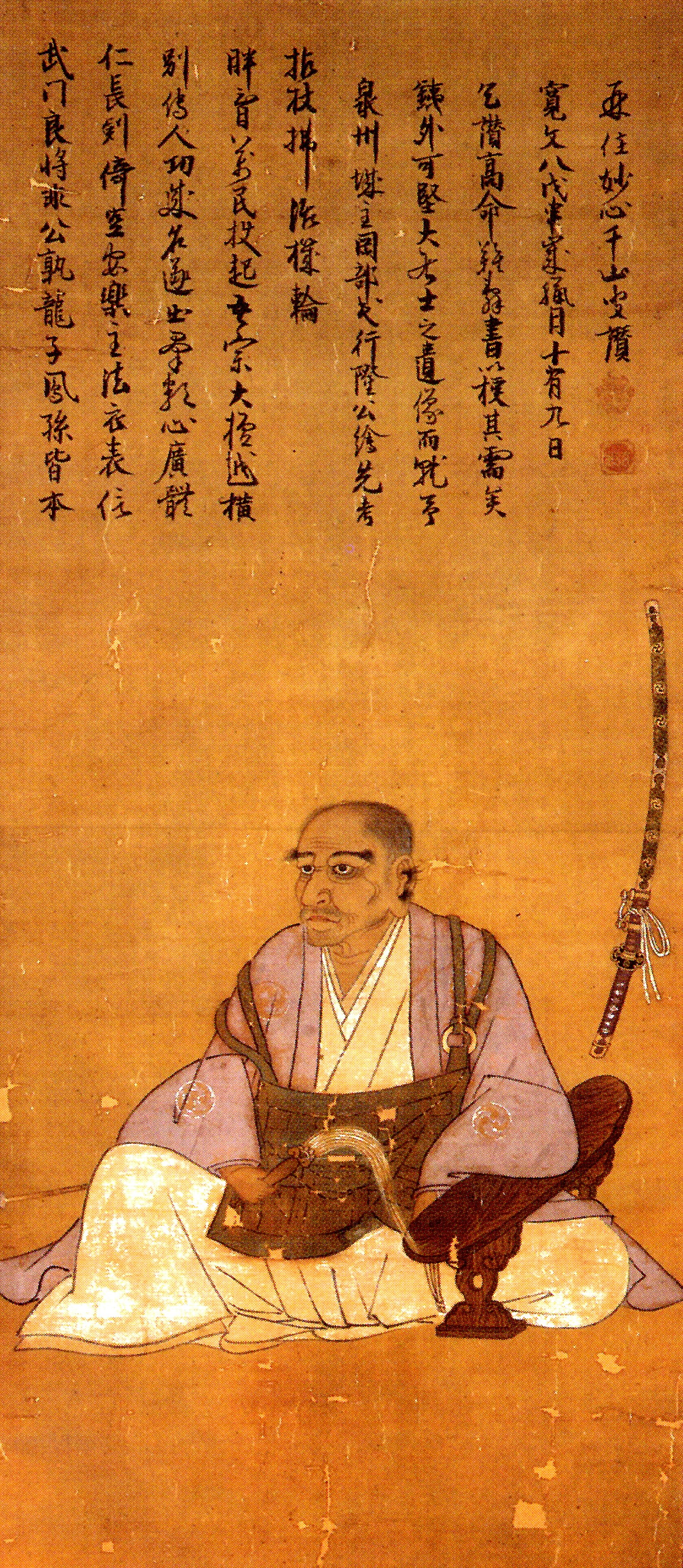 岡部宣勝の肖像。